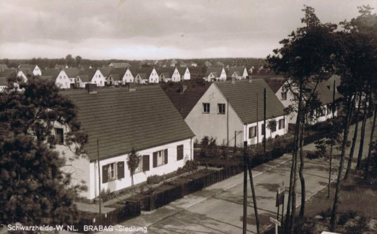 Schwarzheide Siedlung Postkarte um 1938